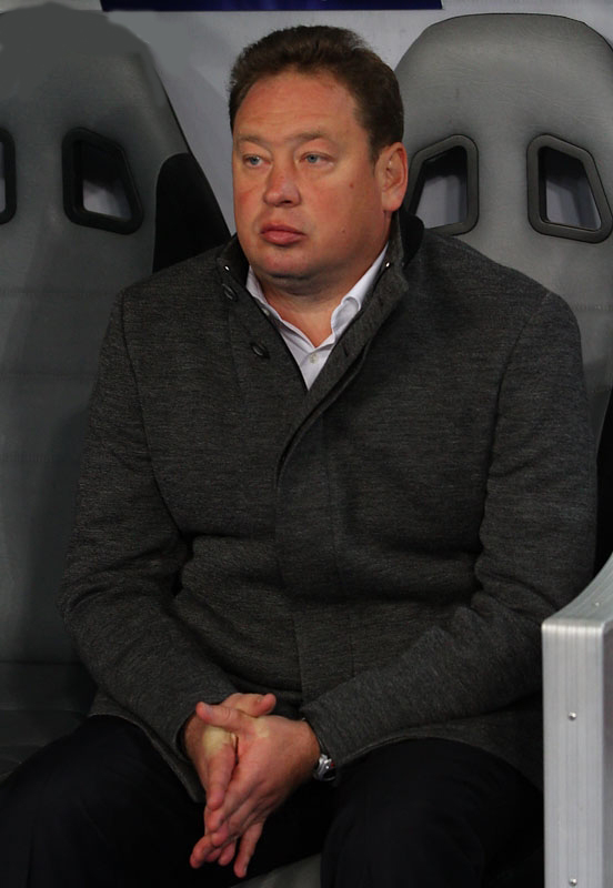 Леонид Слуцкий